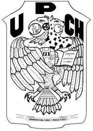 escudo oficial de la UPCH